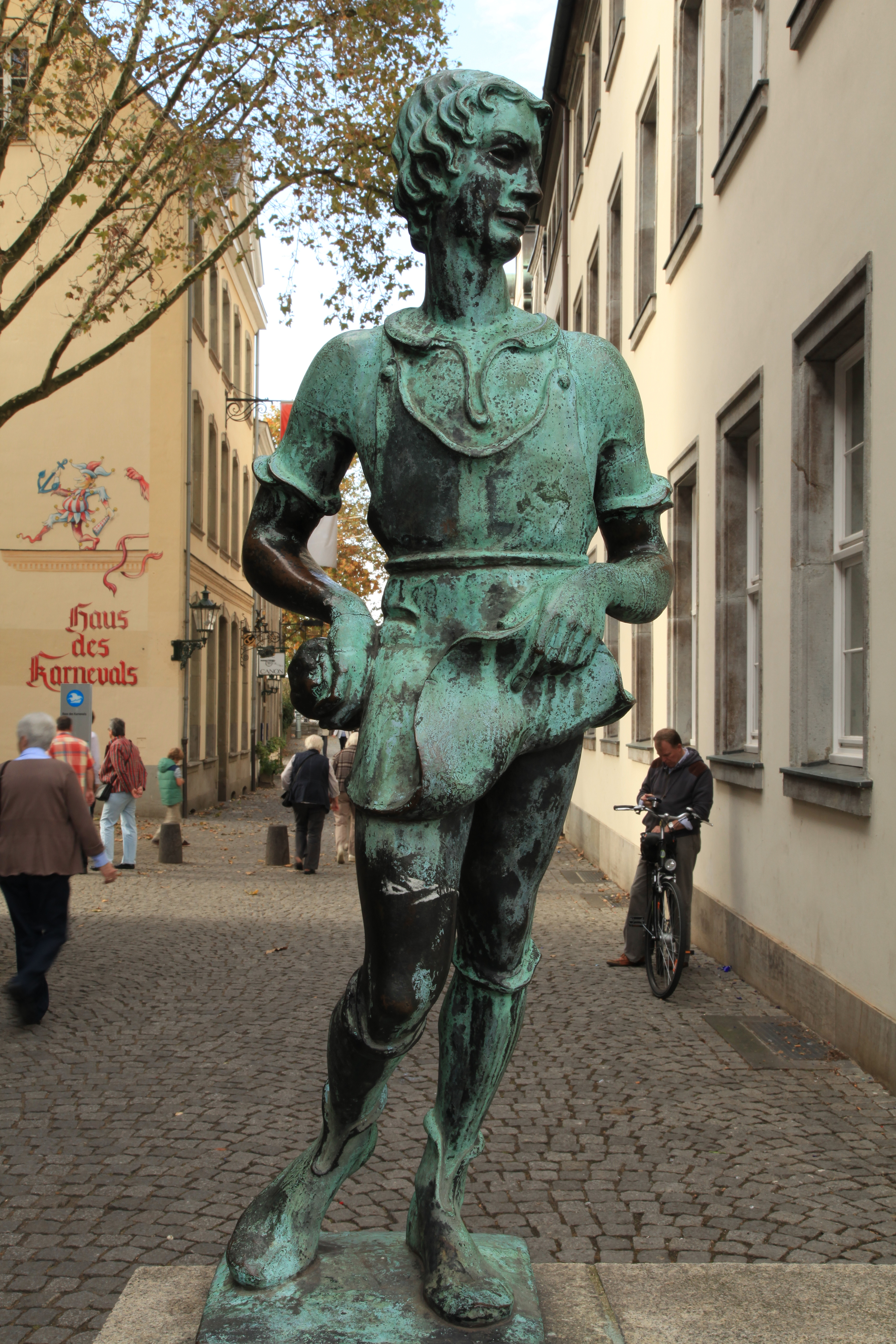 Gießerjunge von Willi Hoselmann am Marktplatz (am Ende der Zollstraße) in Düsseldorf